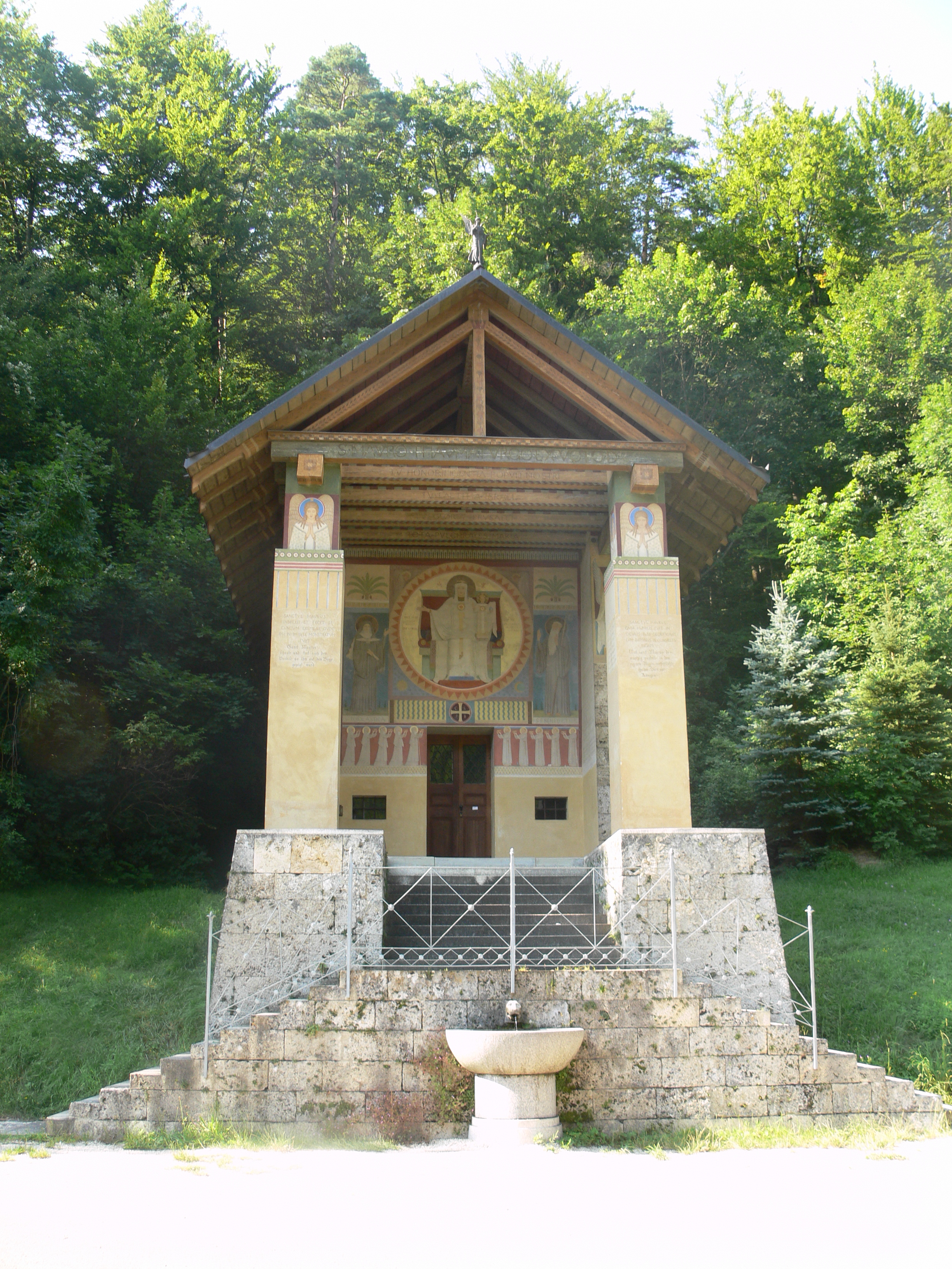 St.-Maurus-Kapelle, Beuron (Donautal), erbaut 1868–1870, Architekt: Desiderius Lenz, Maler: Gabriel Wüger